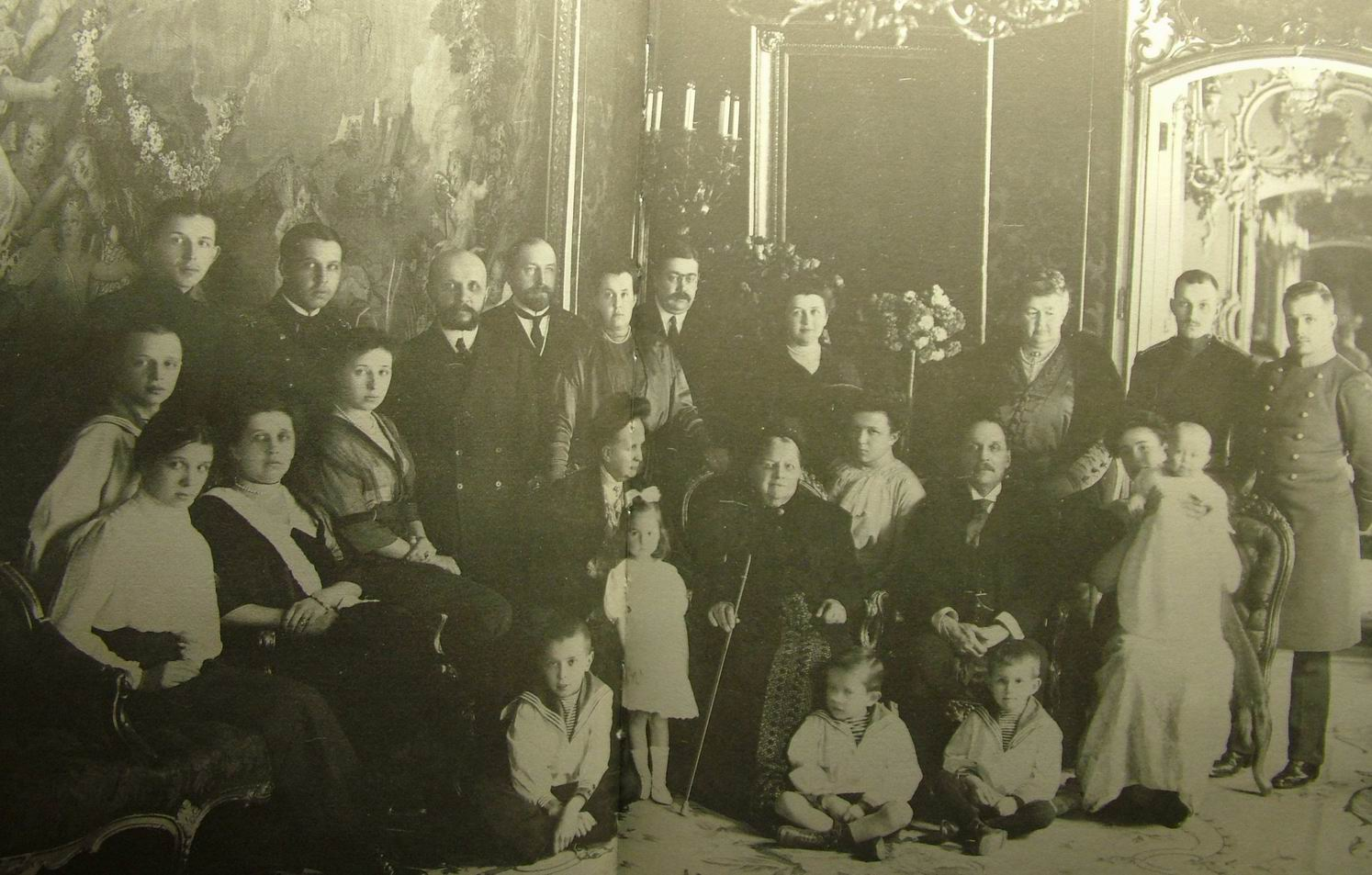 Групповой портрет семейства Мусиных-Пушкиных, 1913 год, накануне войны